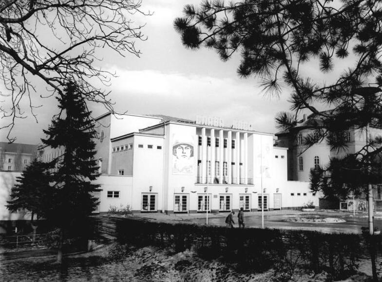 Weimar, Kongresshalle ADN-ZB Demme 7.2.72 Bez. Erfurt: Weimar: Halle- Tagungsort des 11. Parteitages der Liberal-Demokratischen Partei Deutschlands (LDPD) vom 16.2.-19.2.1972 in Weimar. Information added by Wikimedia users. slogan over the entranceruenСЛАВА КПССGLORY TO THE CPSU